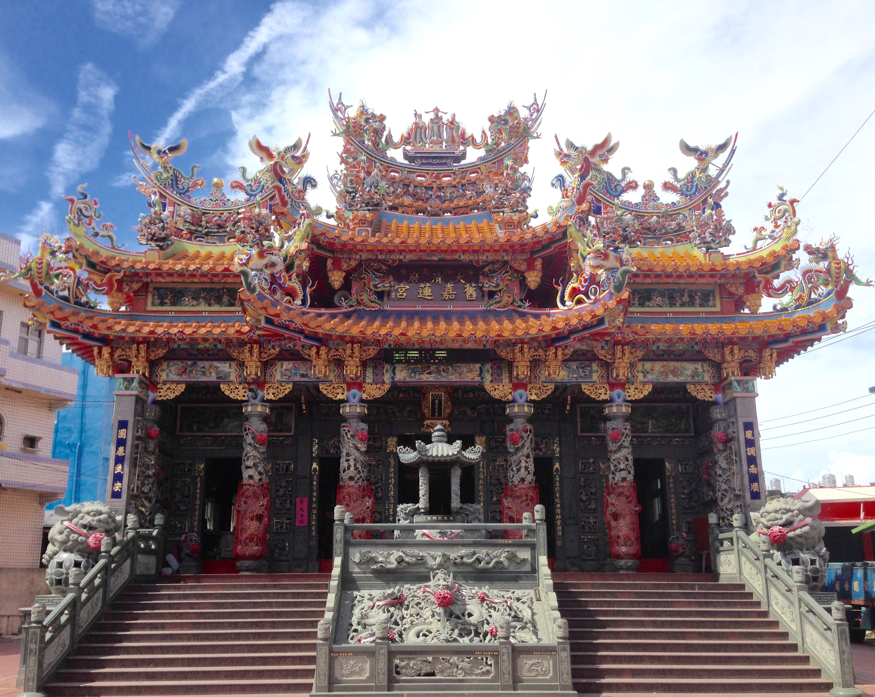 中文（台灣）: 大清府舊嘉蓮宮